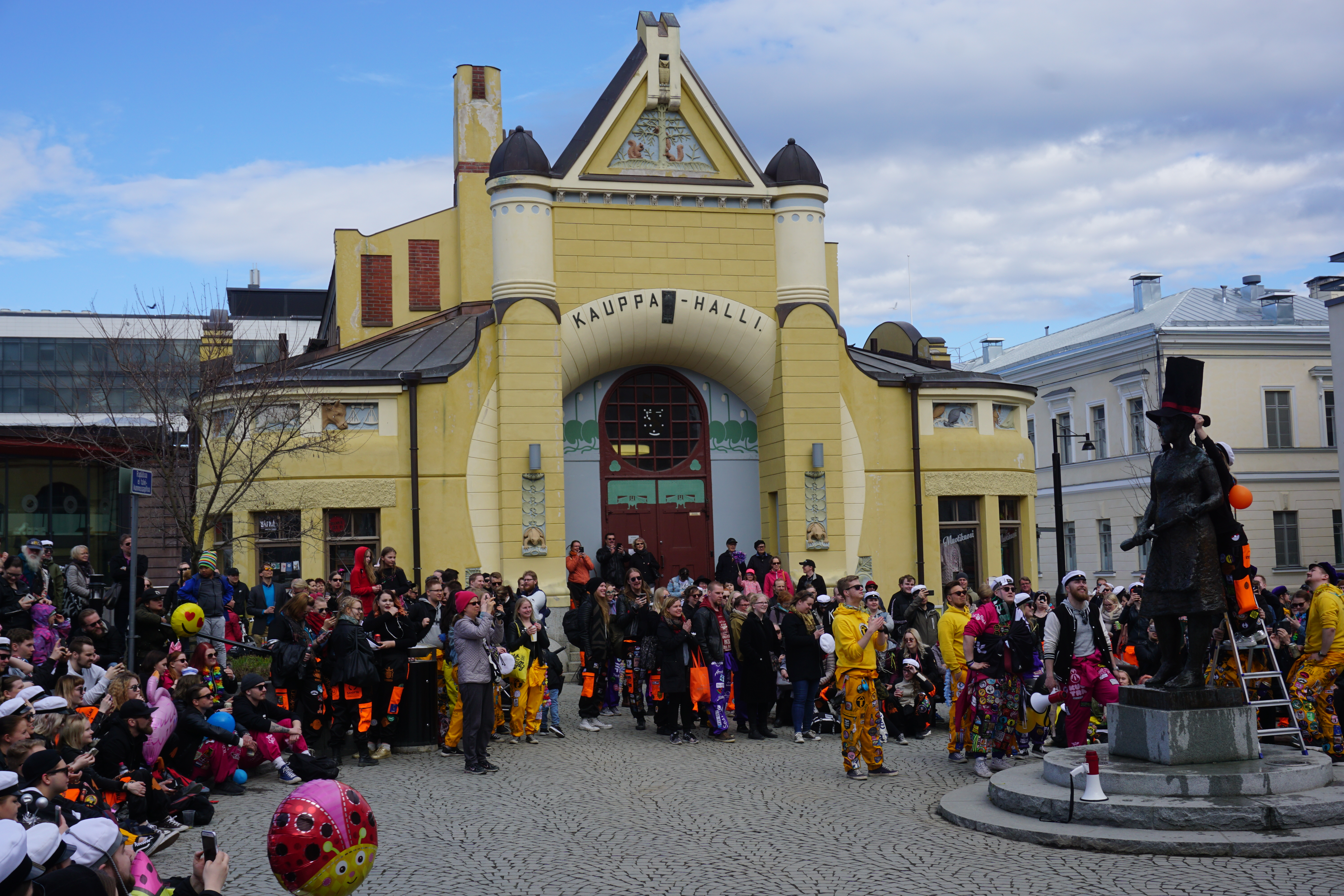 Kuopion kauppahalli. Siskotytön lakitus vappuaattona 2018.